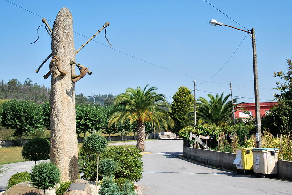 évocation de la musique locale